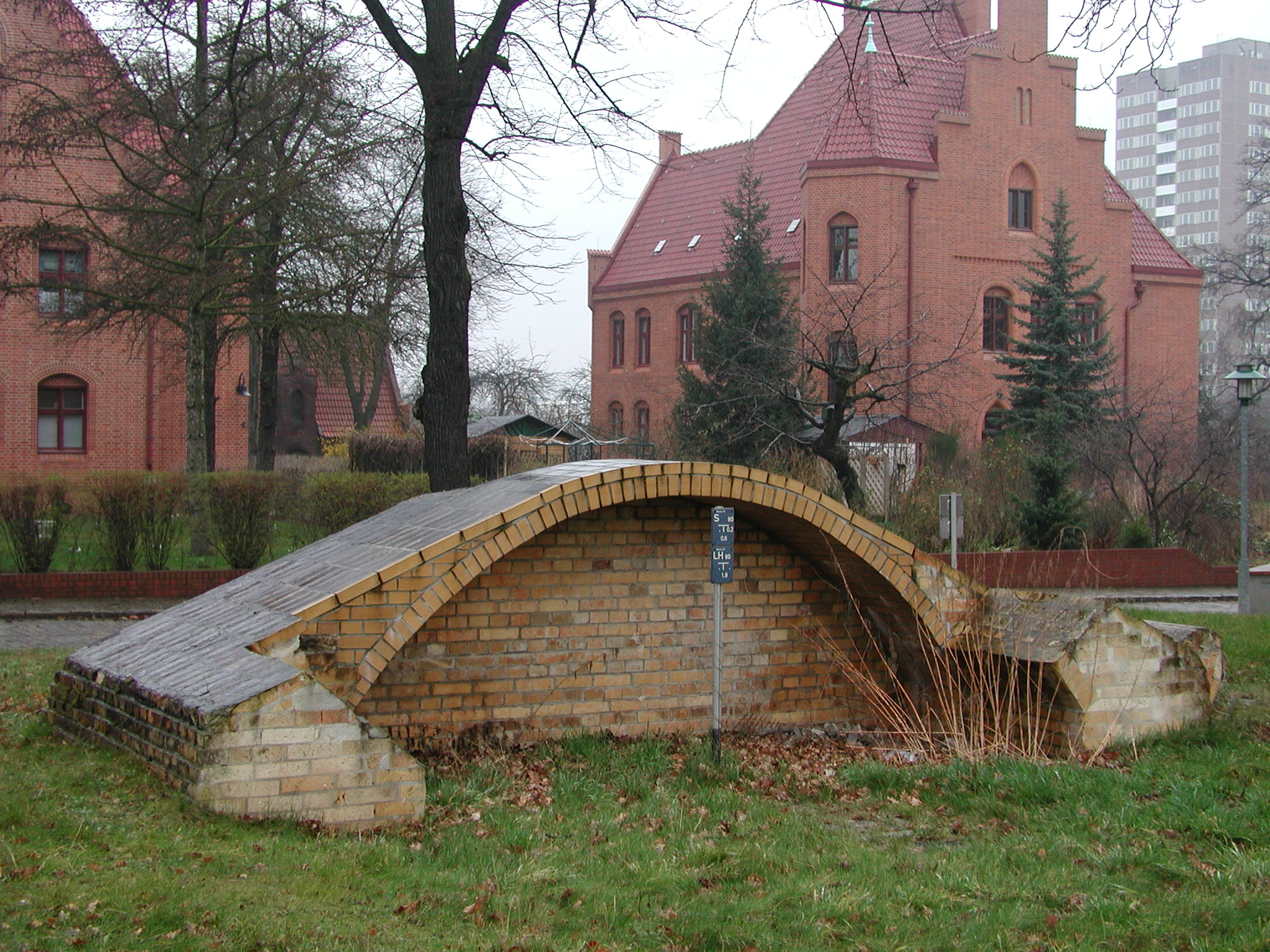 Berlin, Lichtenberg, Landsberger Allee, Wasser-Zwischenpumpwerk: wettergeschützte Belüftung eines Reinwassertanks